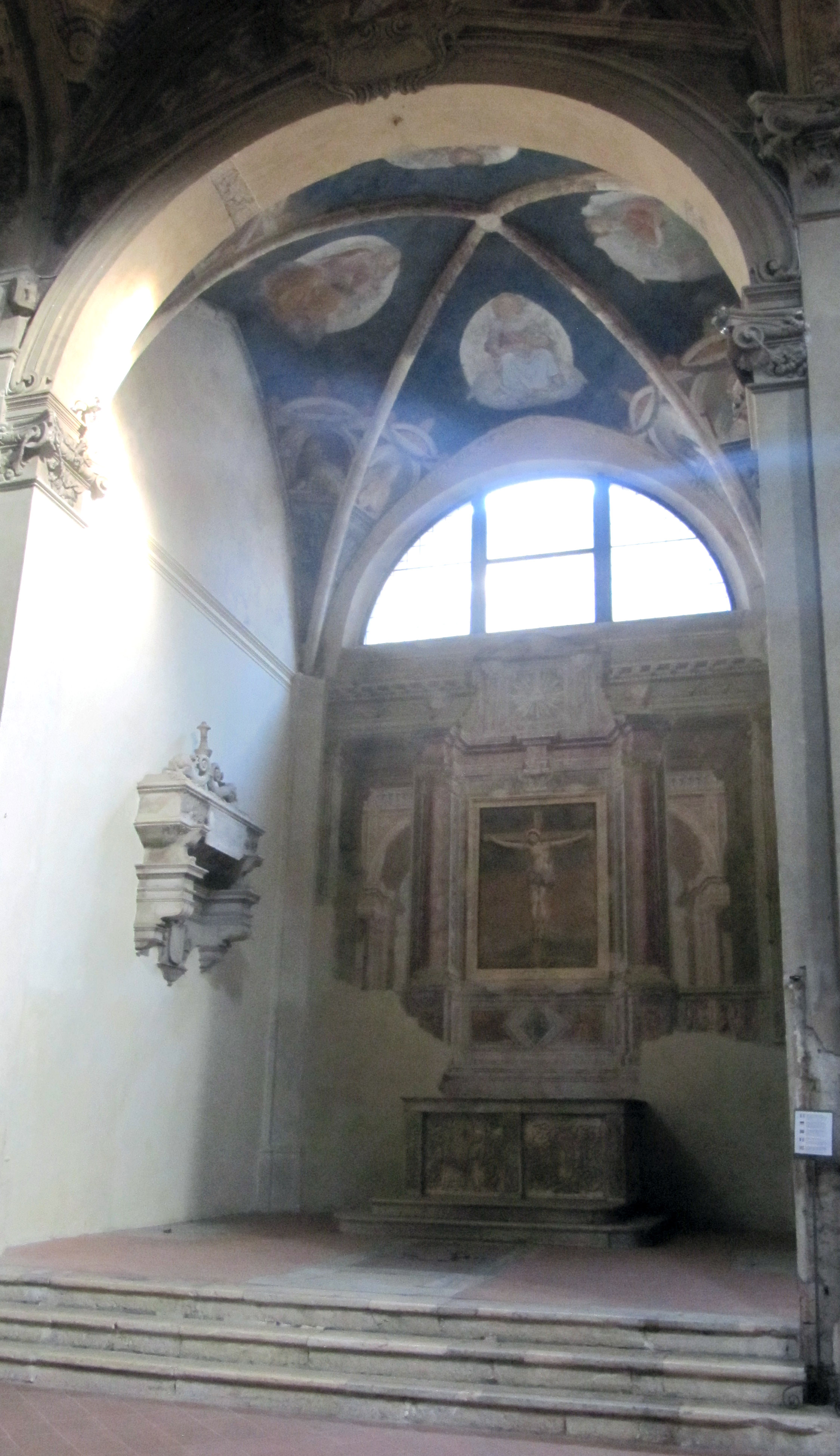 Cappella Averoldi (Santa Maria del Carmine, Brescia)